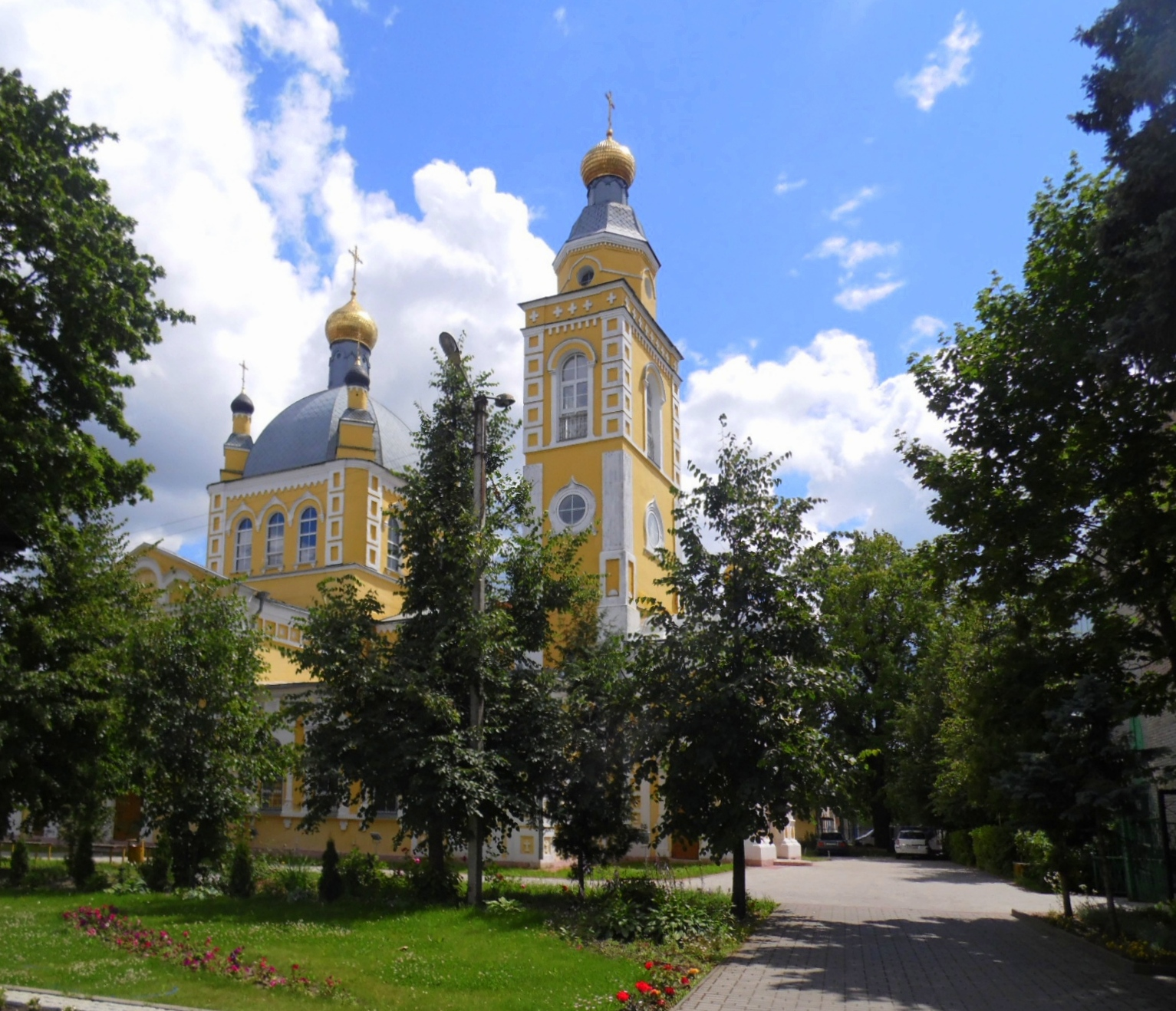 Церковь Петра и Павла (Брянская область, Клинцы, Октябрьская улица, 7)